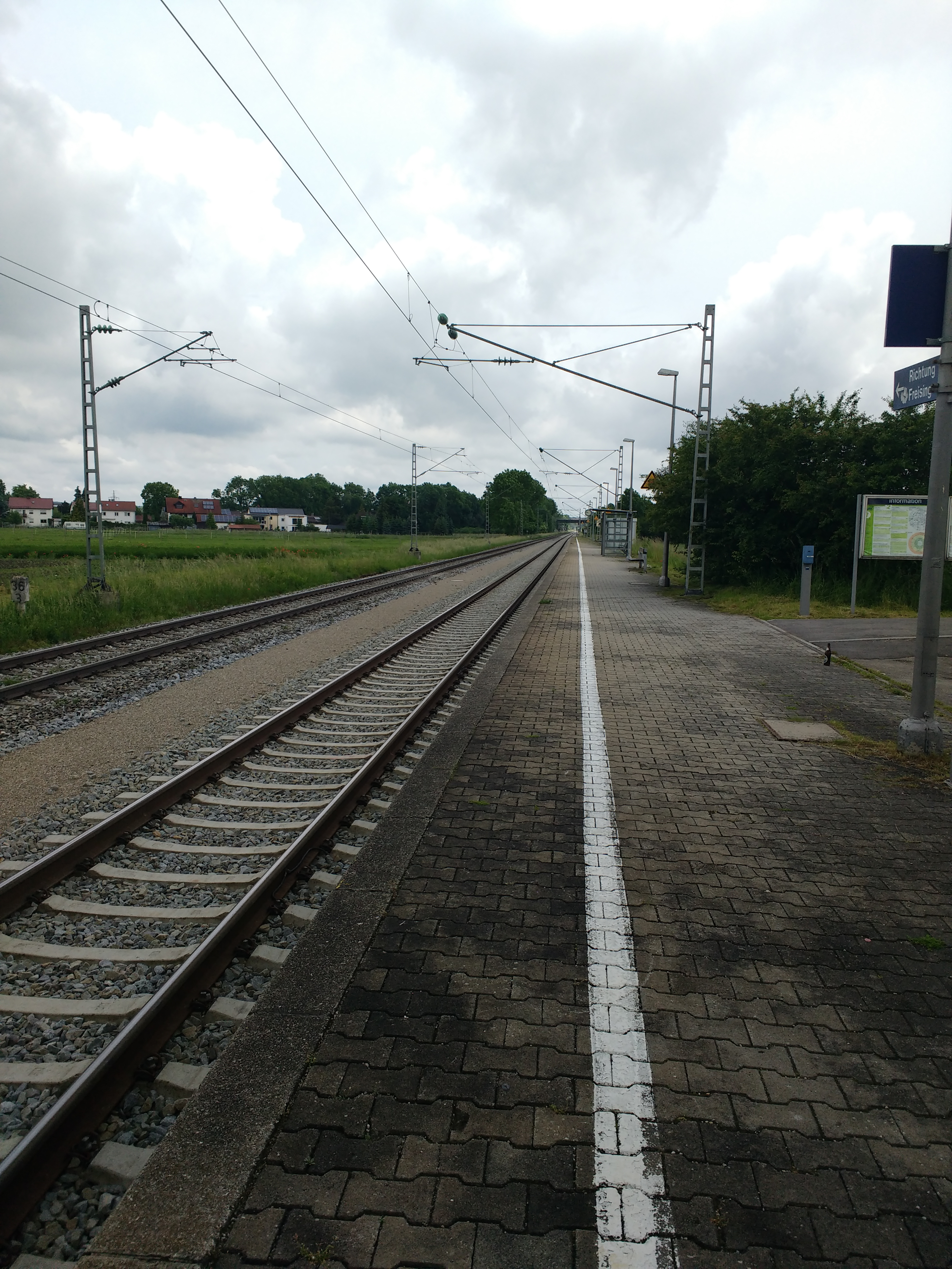 Haltepunkt Pulling (Freising)